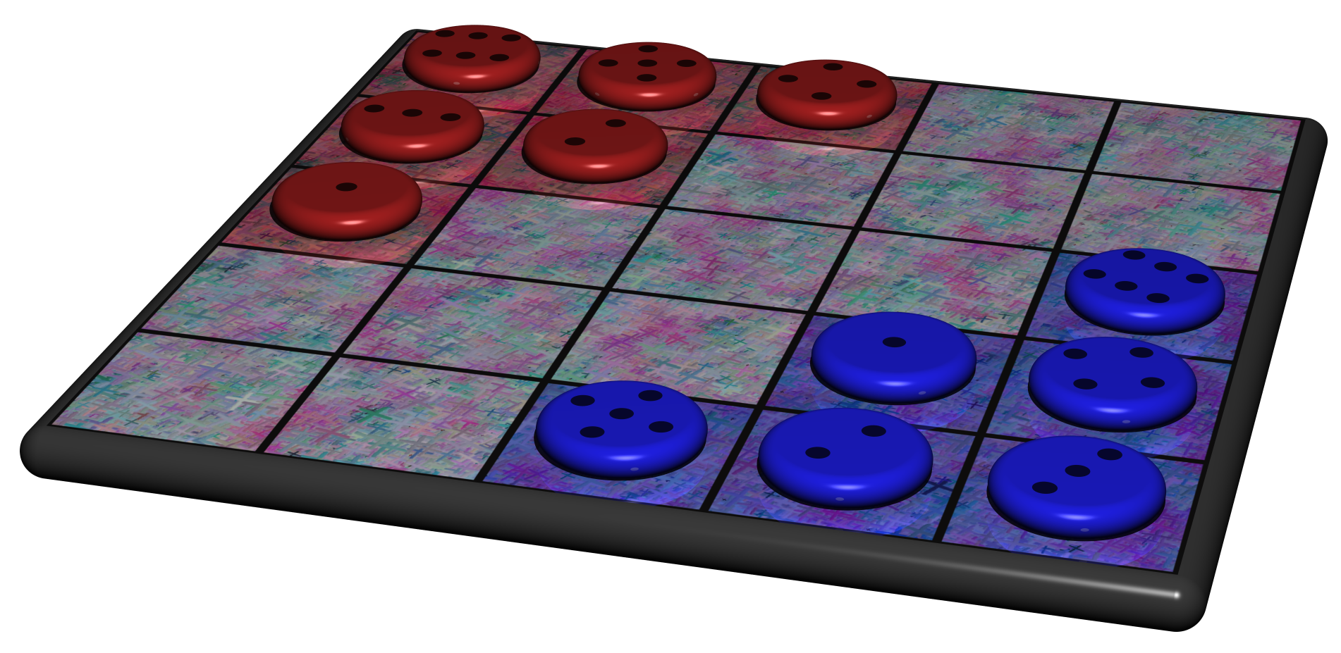 Spielbrett von EinStein würfelt nicht in 3D, mit Spielsteinen